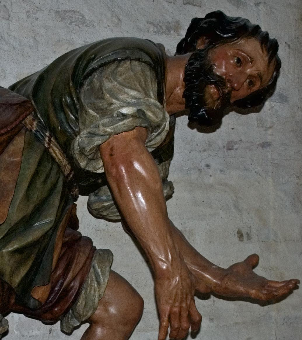 Detalle de la talla del Cirineo esculpido por Ruiz Gijón